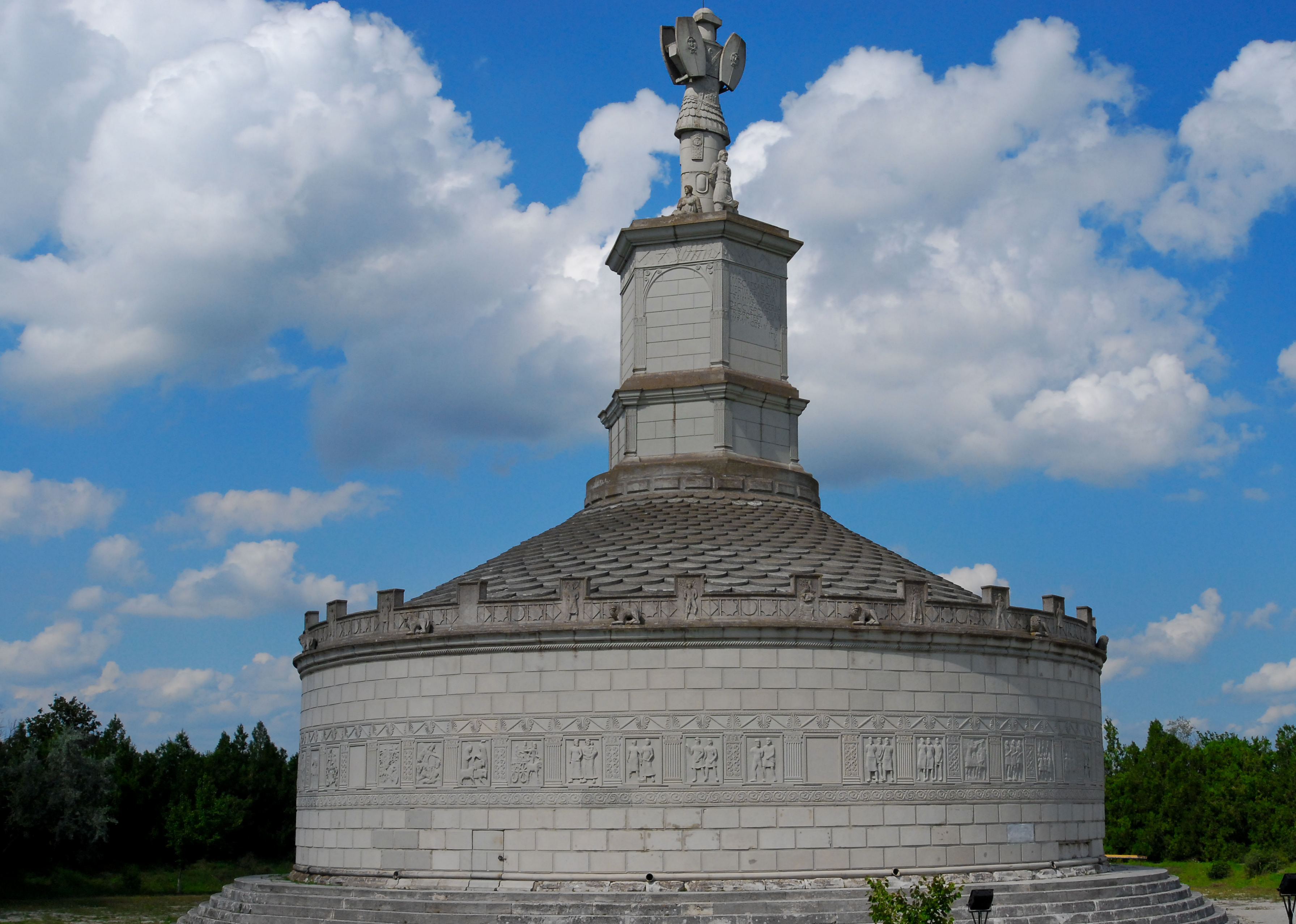 Monumentul refacut Tropaeum Traiani, initial construit pentru omagierea victoriei imparatului roman Traian impotriva dacilor condusi de Decebal 05